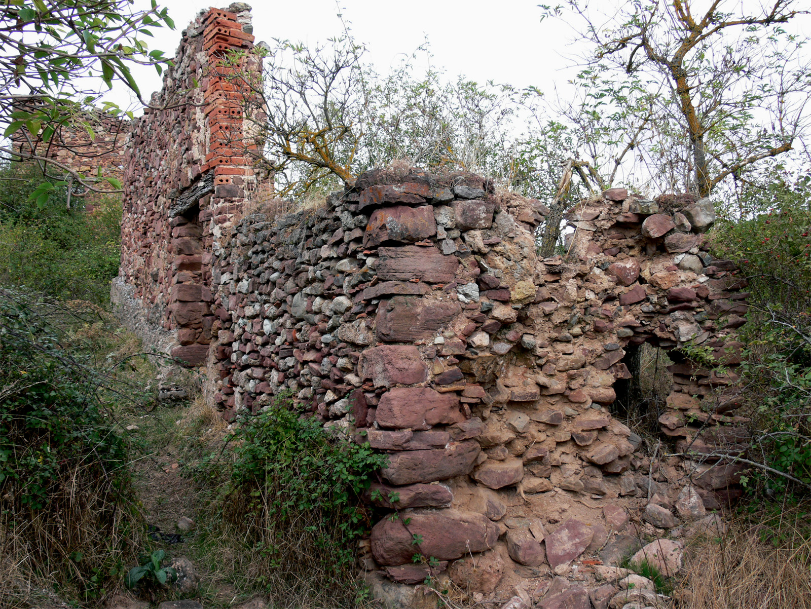 Ruinas de la iglesia de San Miguel en Ollora, despoblado de Pazuengos (La Rioja - España)